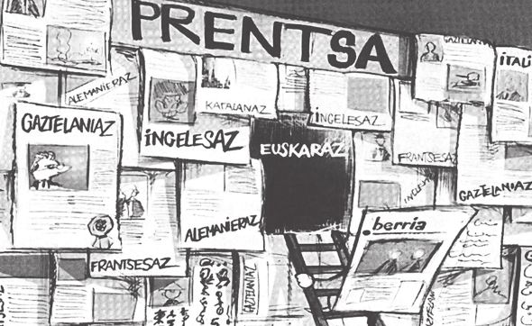 Prentsa